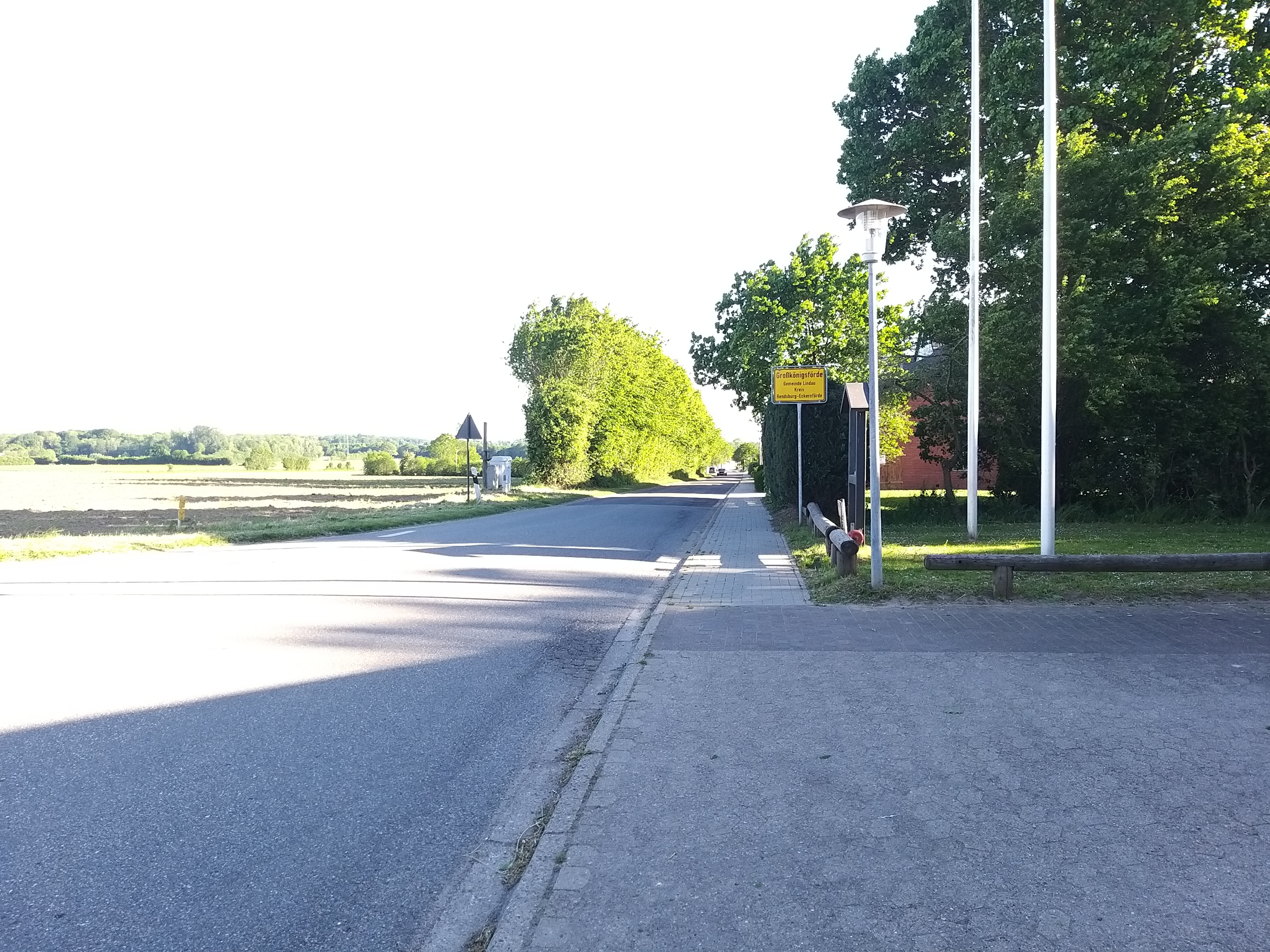 Großkönigsförde